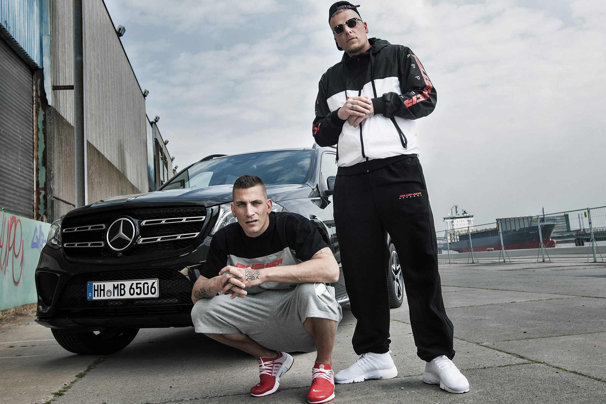 Gzuz und Bonez MC - Pusher Apparel